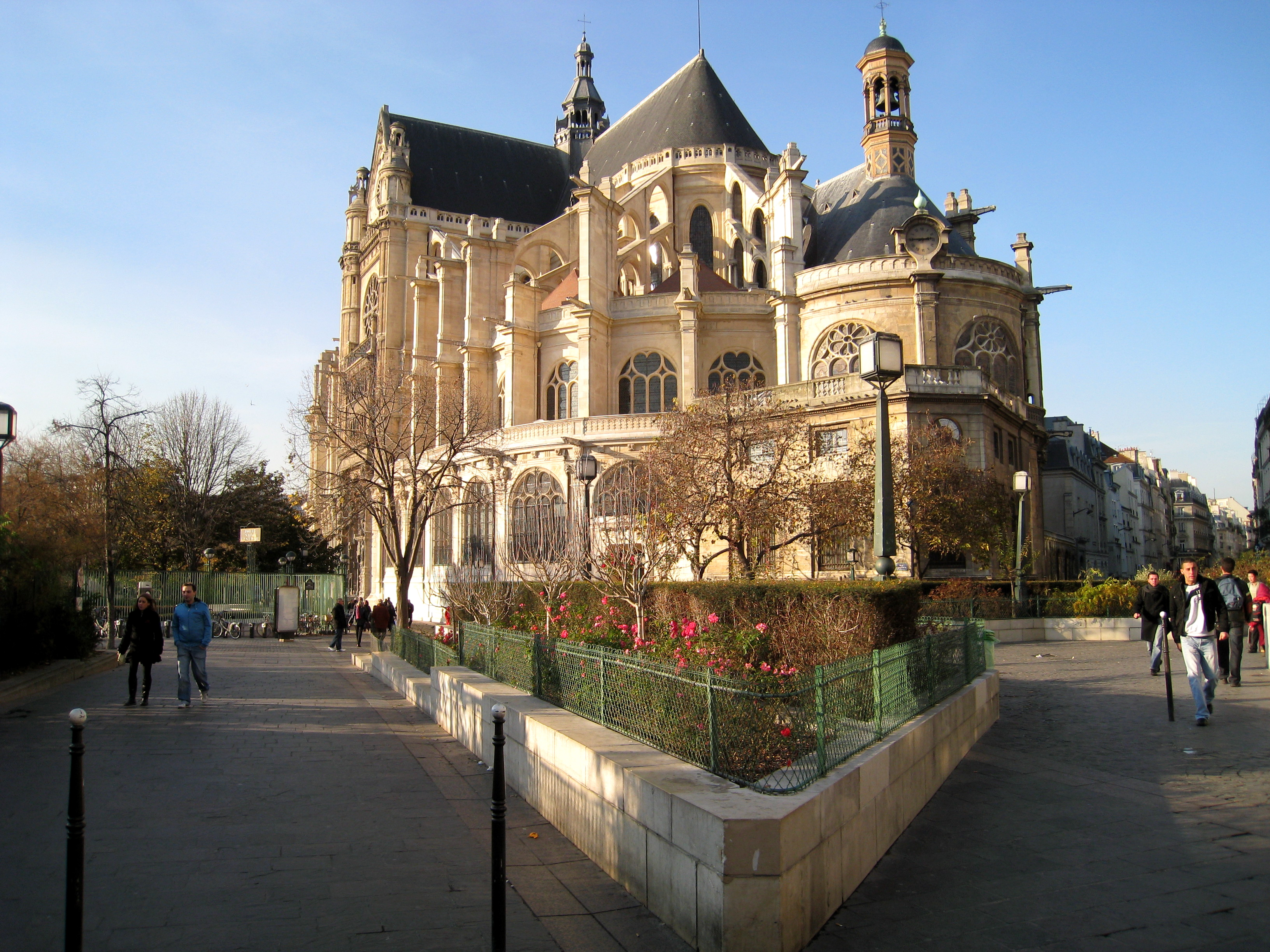 Eglise Saint Eustache, Paris, France